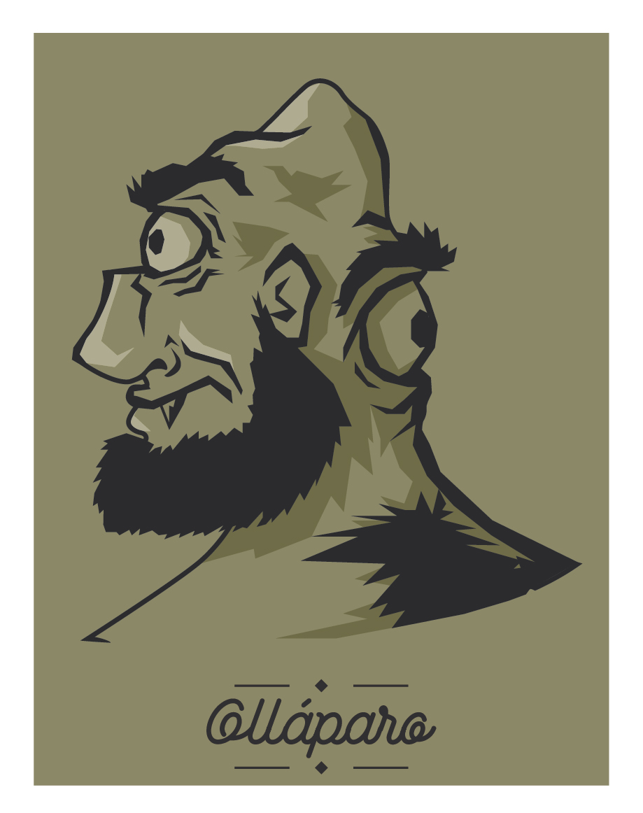 Ilustración representativa dun olláparo, ser mitolóxico galego.